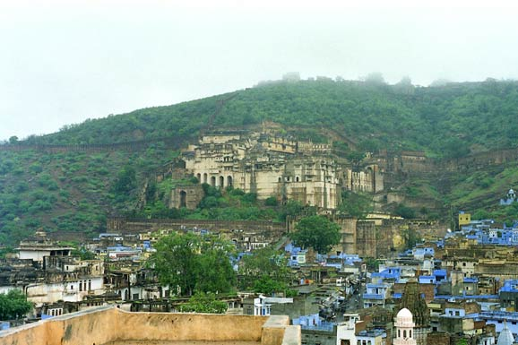 Vue de la citadelle de Bûndi